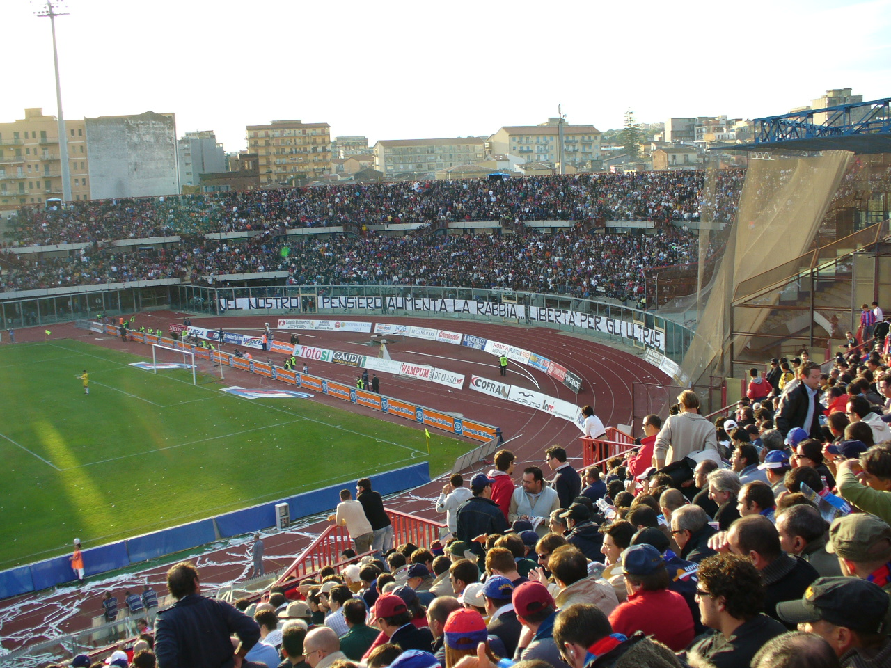 Catania X Livorno - Temporada 2006/2007 Essa "gaiola" à direita - aonde estah a rede de proteçao - é a parte dedicada à torcida adversaria.